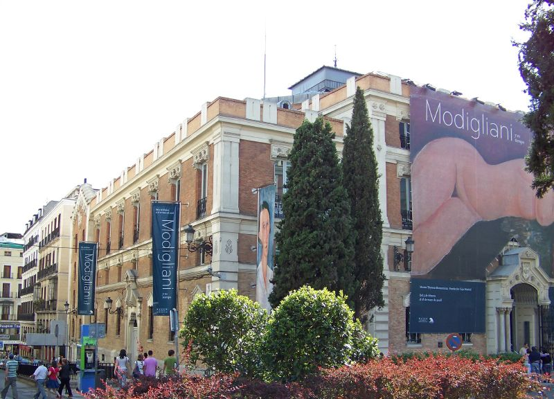 Fundación Caja Madrid- Thyssen Modigliani Part II